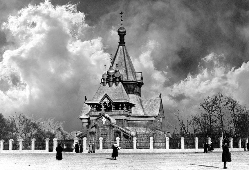 St Nicholas' Russian Orthodox Church in Harbin, China, circa 1925.